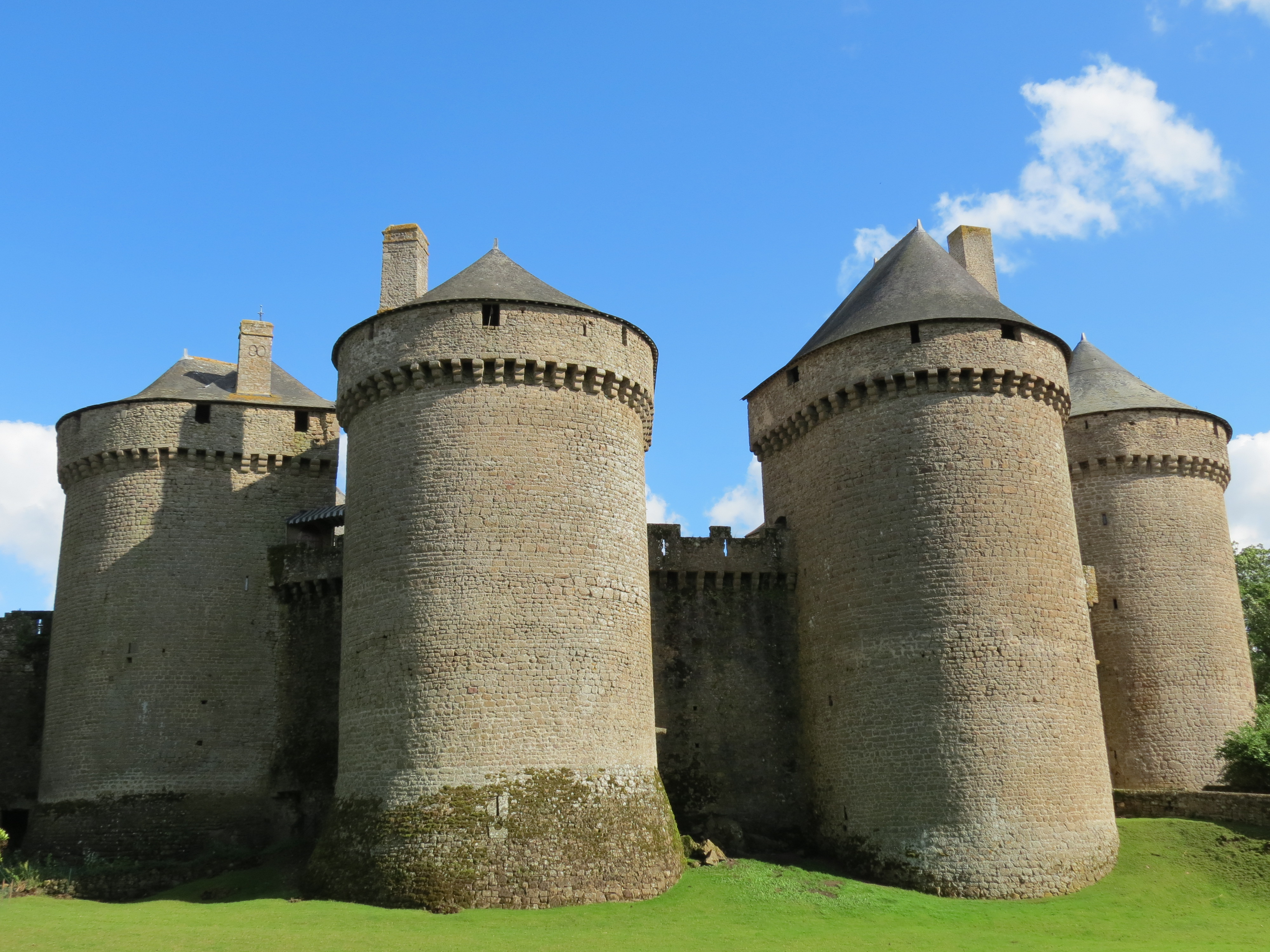 Château de Lassay, dans la Mayenne, Pays de la Loire. Object location48° 26′ 20″ N, 0° 30′ 00″ W